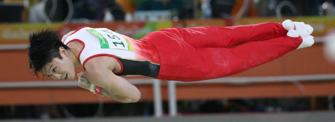 Kohei Uchimura, considerado o ginasta mais completo da atualidade, provou seu valor mais uma vez e arrebatou mais um ouro no Rio